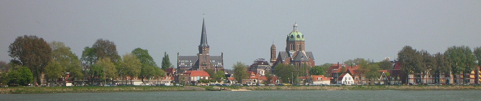 Skyline van Hoorn (Noord-Holland).